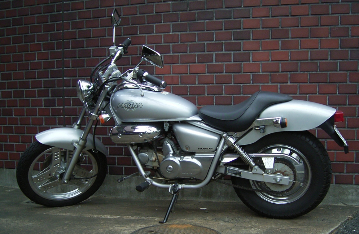 Honda MAGNA50